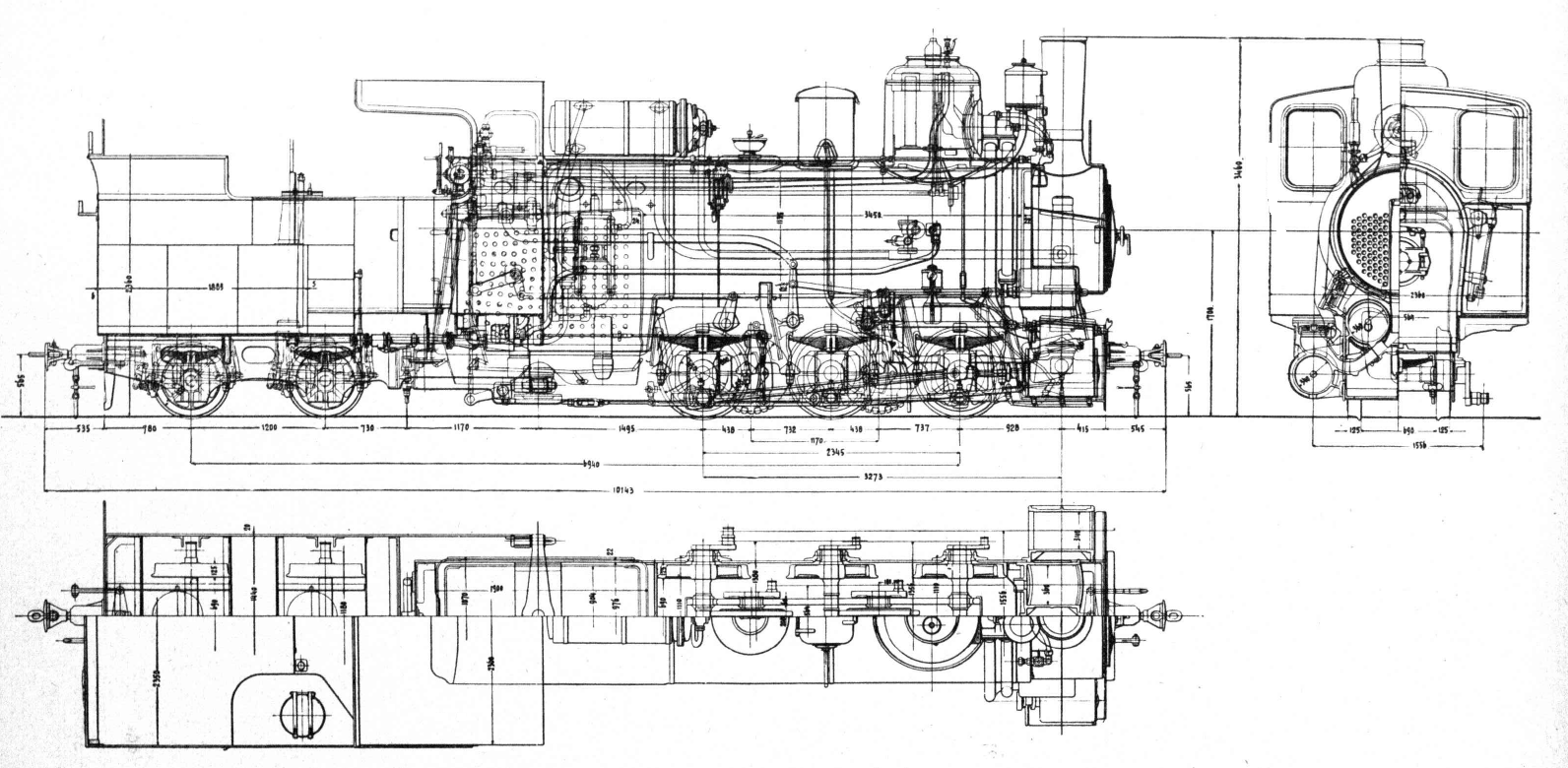 Typenskizze der Reihe IIIc5. Die Stütztenderlokomotiven mit drei Kuppelachsen für Adhäsions- und Zahnradantrieb in Bosnischer Spurweite wurden von den Bosnisch-Herzegowinischen Staatsbahnen (BHStB) und ihren Nachfolgerinnen, den Bosnisch-Herzegowinischen Landesbahnen (BHLB) und den Eisenbahnen des Königreichs Serbien, Kroatien und Slowenien beschafft. Bei den Jugoslawischen Eisenbahnen (JDŽ, später JŽ) wurde sie als Baureihe 97 bezeichnet. Sie ist mit 38 Exemplaren die meistgebaute Zahnradlokomotive der Welt.